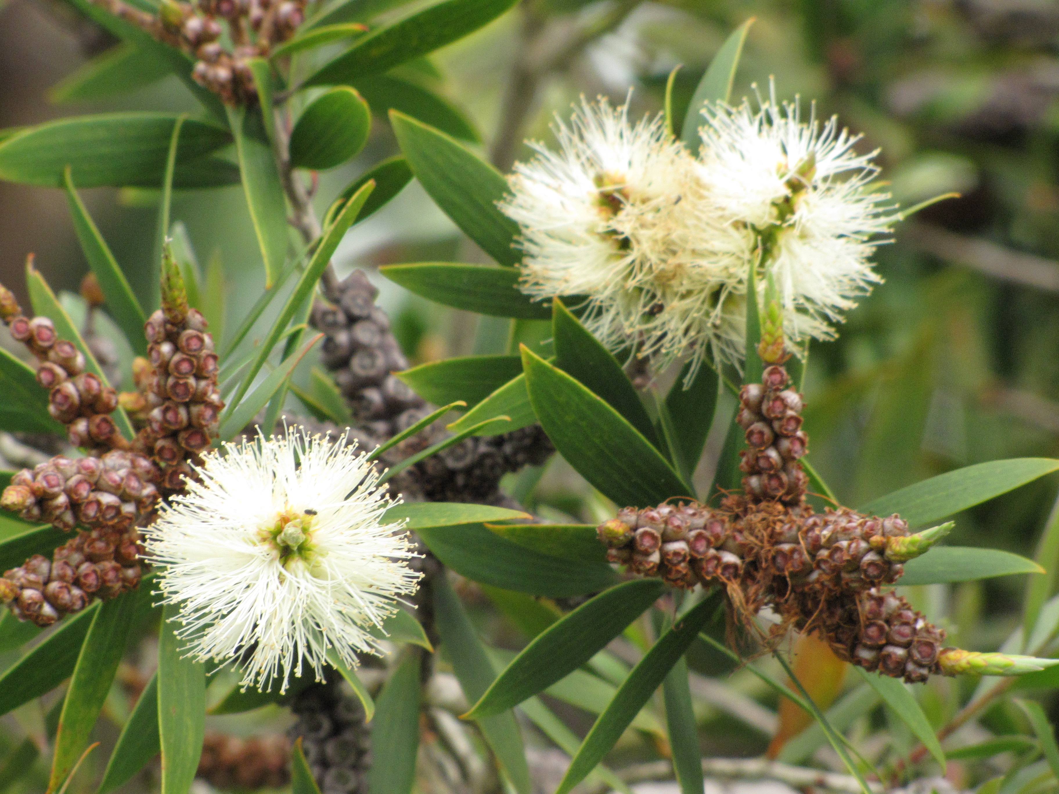 Melaleuca quinquenervia (Paperbark, punk tree) Flowers at Kula Botanical Garden, Maui, Hawaii. March 07, 2011 #110307-2316 Image Use Policy